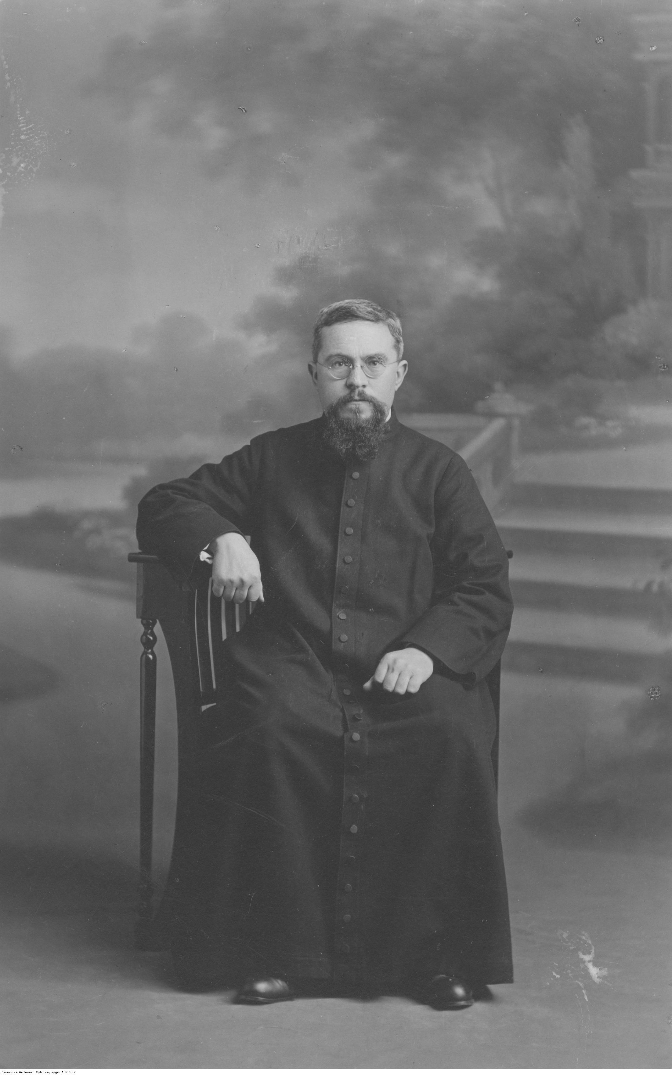 O. Gerard Piotrowski - bernardyn, administrator apostolski Syberii.